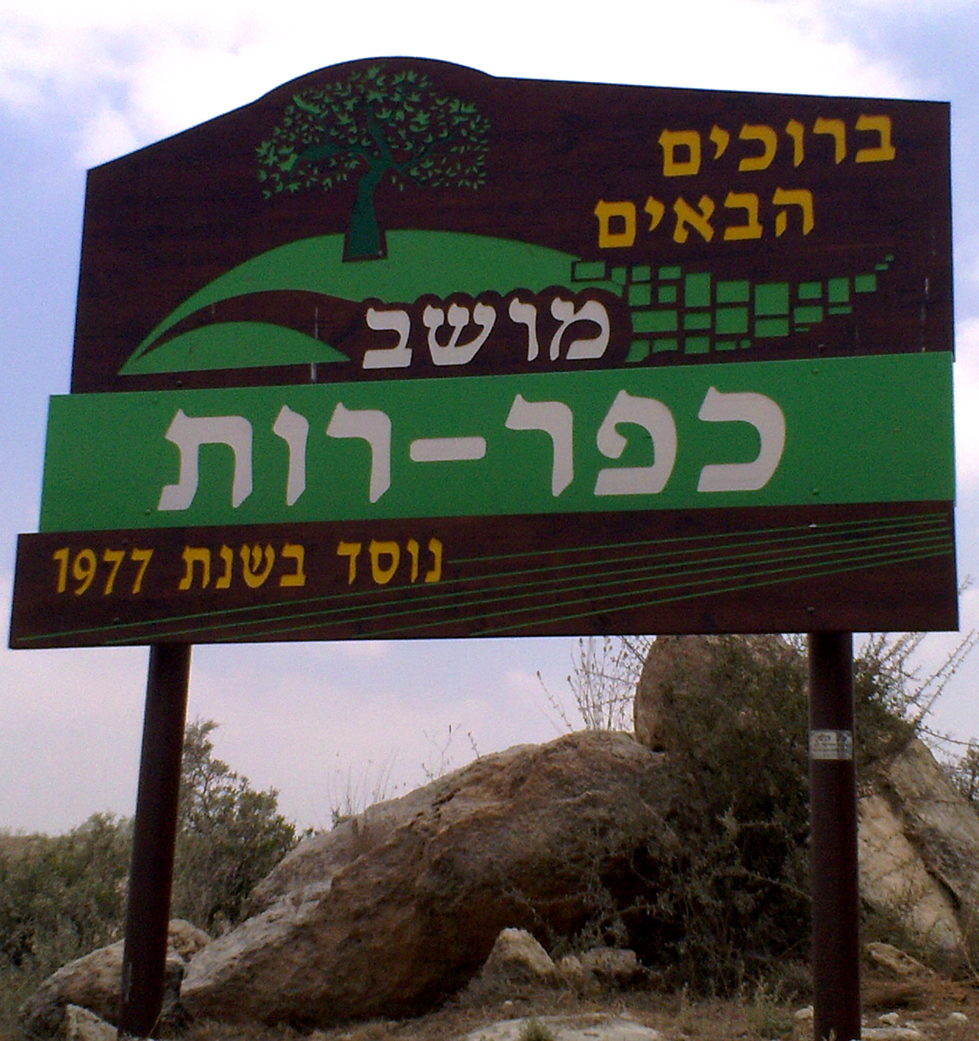 כפר רות שלט הכניסה למושב